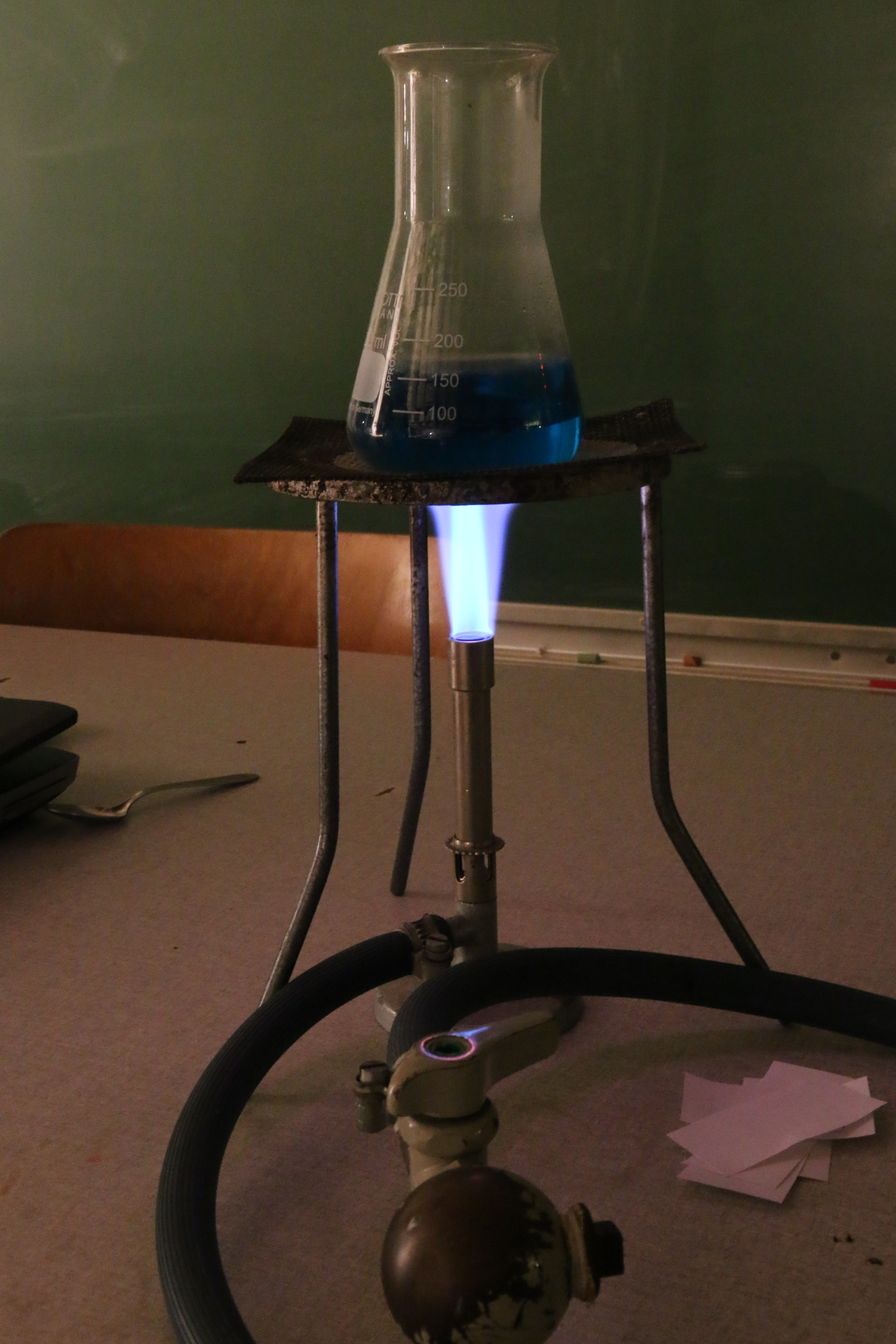 Een bunsenbrander in het scheikundelokaal